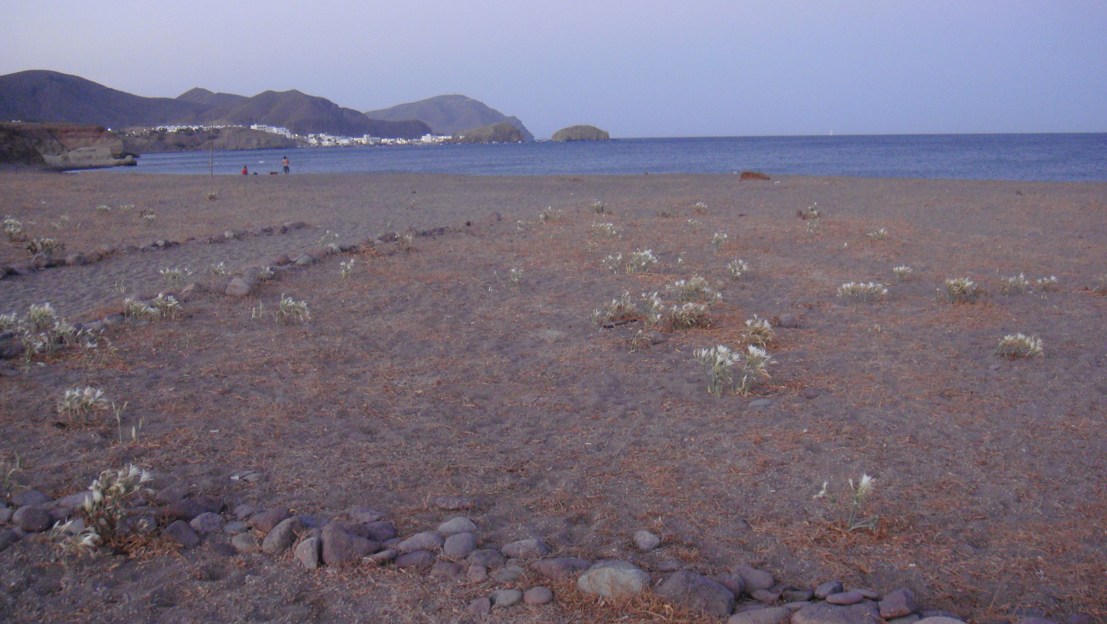 playa de los Escullos, en Nijar, provincia de Almería (España). Se encuentra dentro del Parque natural del Cabo de Gata-Níjar.